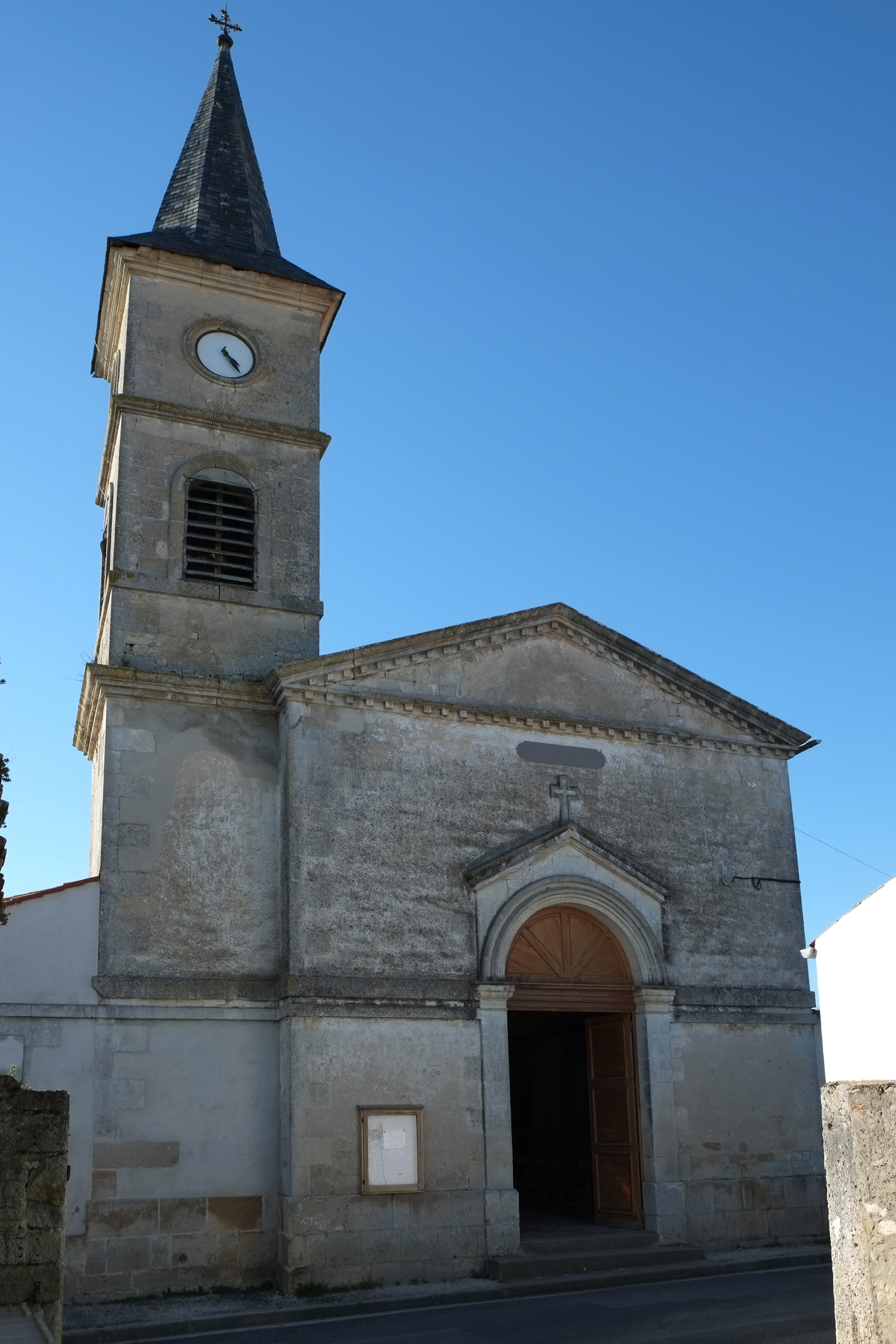 Église de la Nativité de la Sainte Vierge Ciré-d'Aunis Charente Maritime France